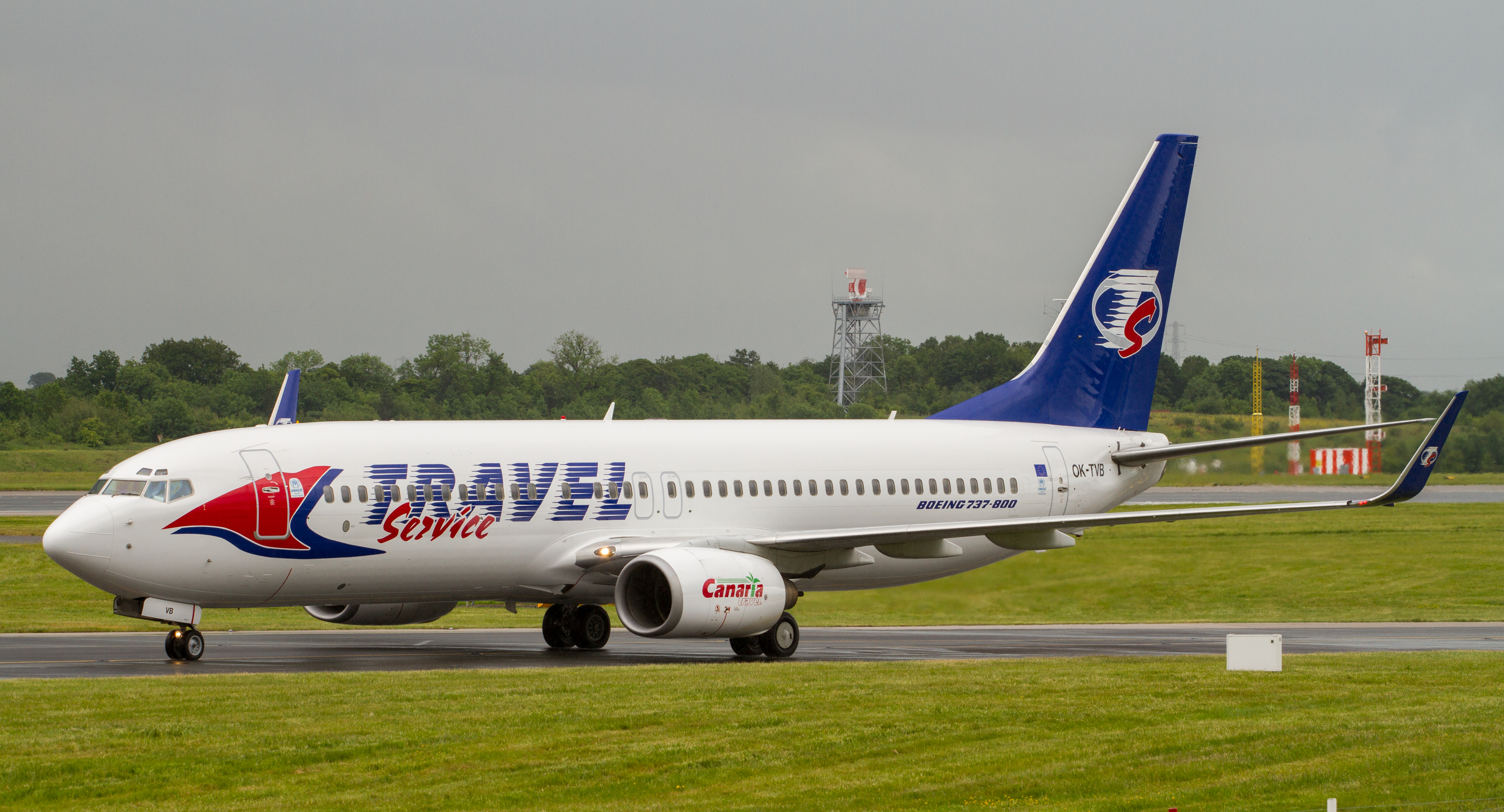 Manchester 13.06.13.